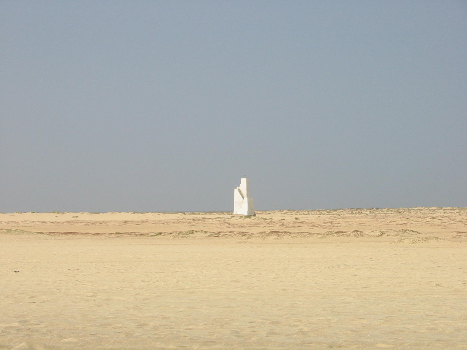 capo verde isola di sal